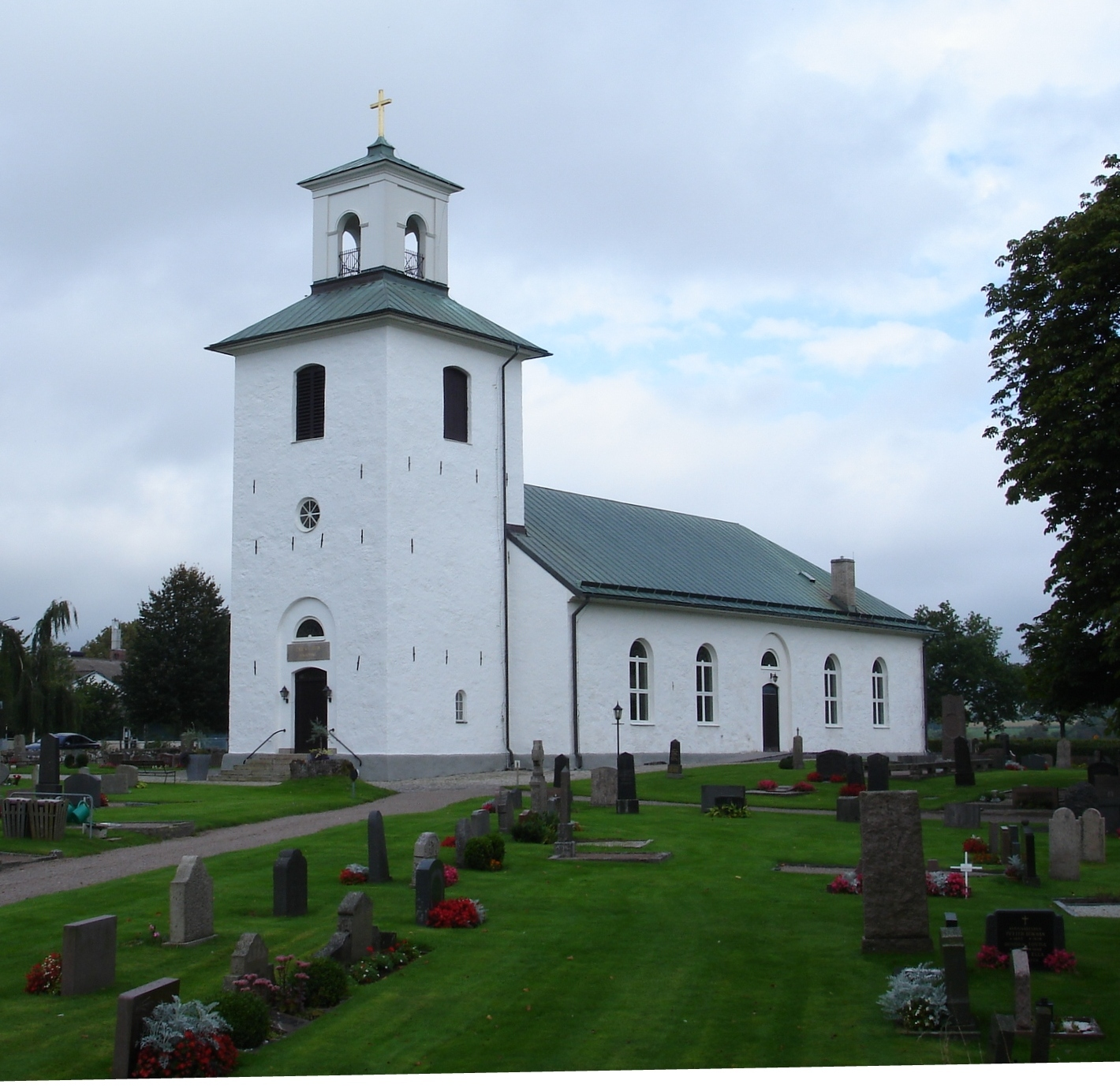 Enslövs kyrka från sydväst en septemberdag 2011